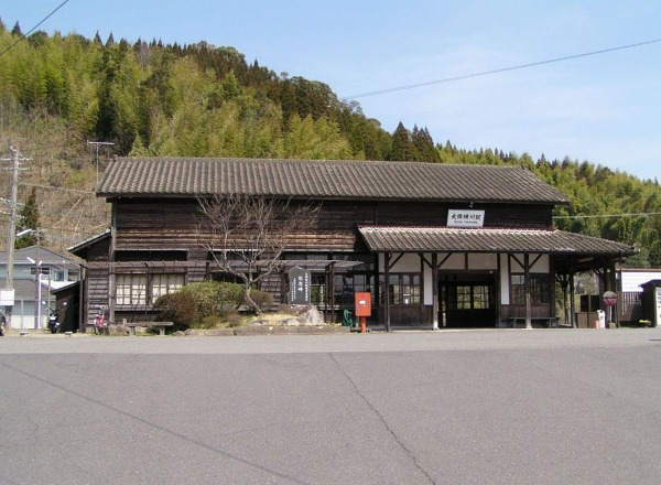 2005年3月29日に投稿者がja:大隅横川駅にて撮影。